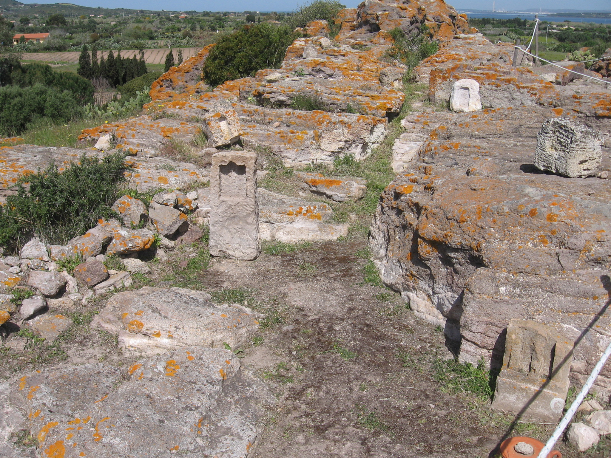 Tofeth fenicio di_Sant'Antioco_Sardgnia